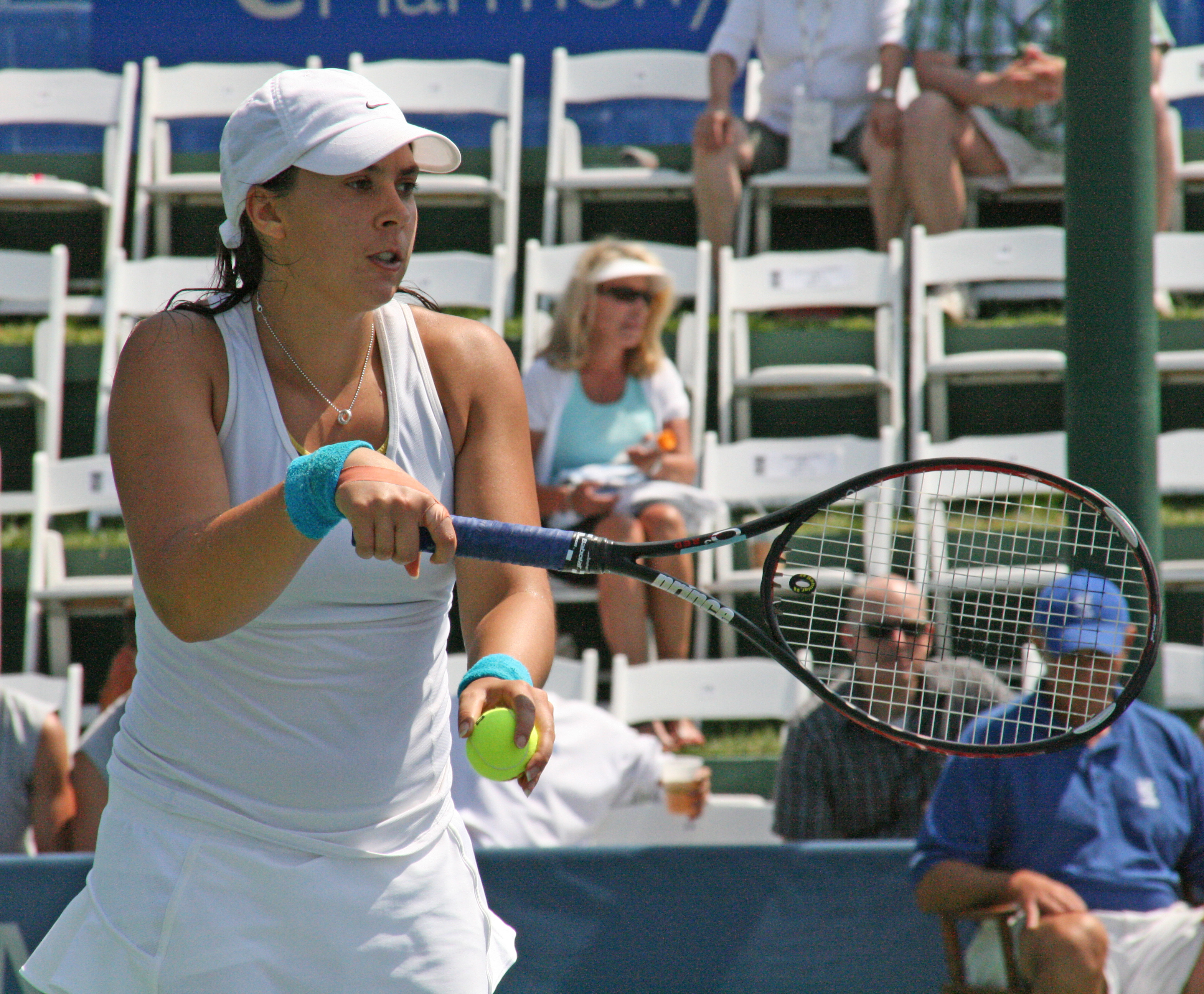 Marion Bartoli at Acura Classic, 2007.